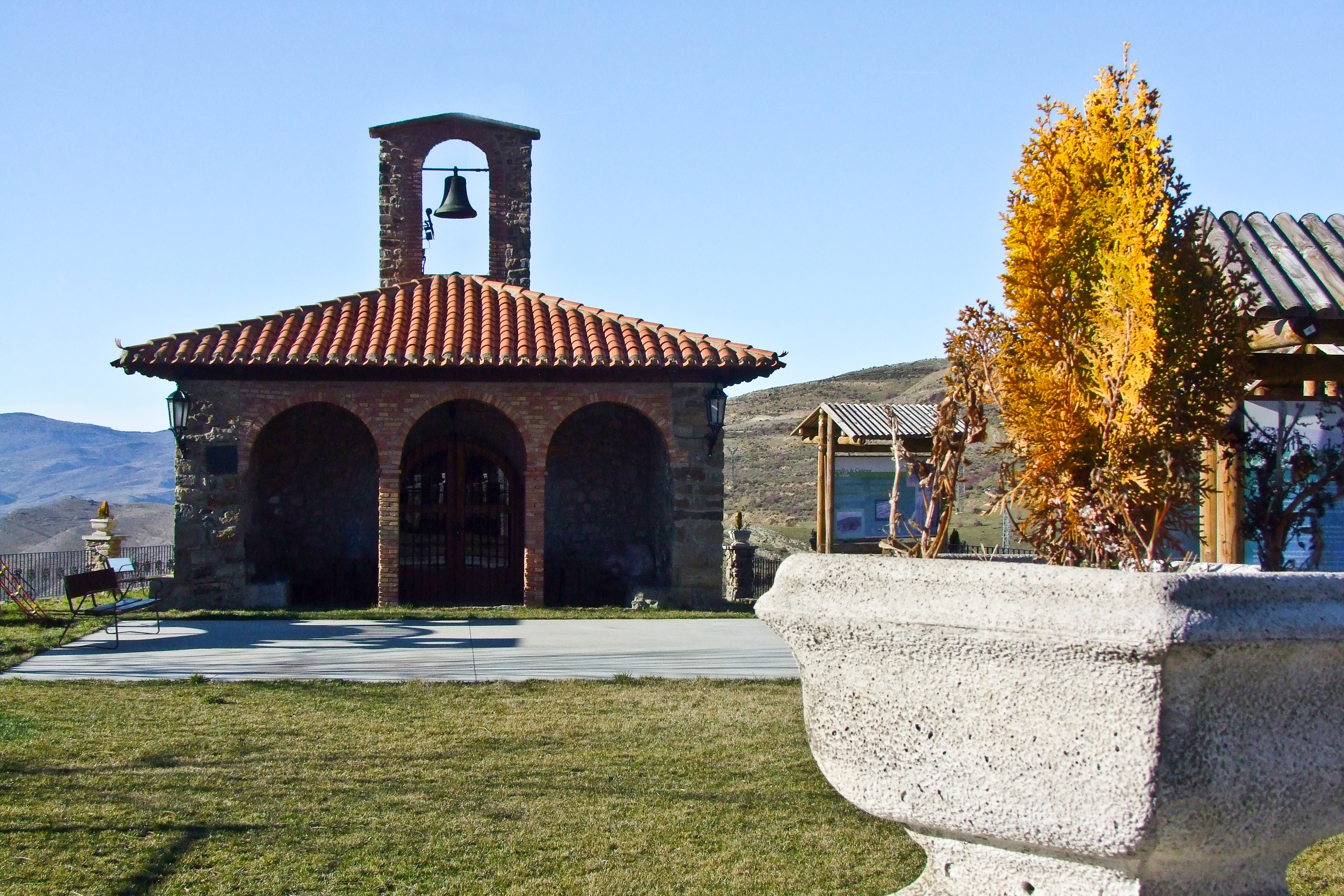 Ermita de San Adrián en la localidad de Hornillos de Cameros, La Rioja - España